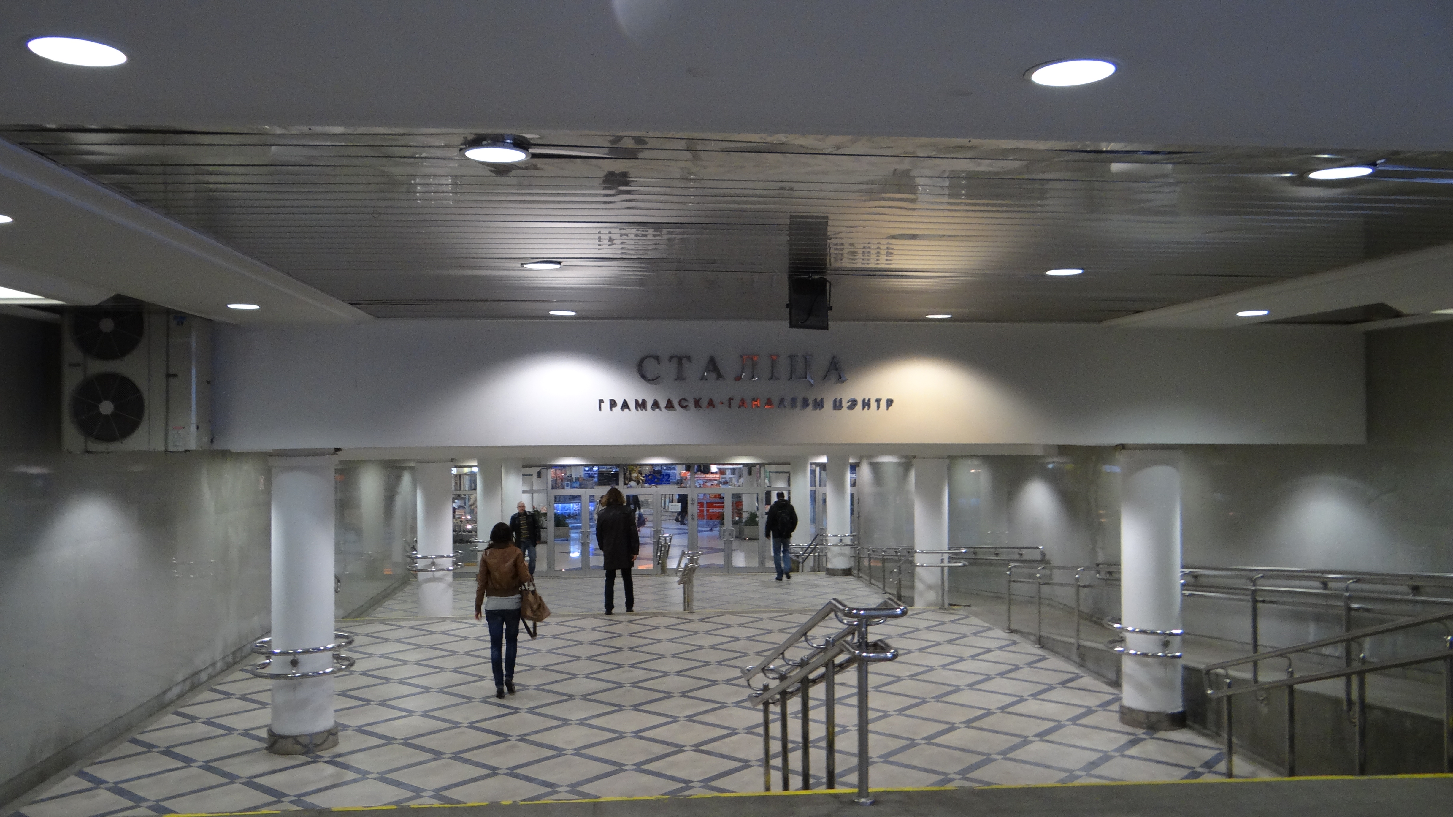 Minsk, Belarus